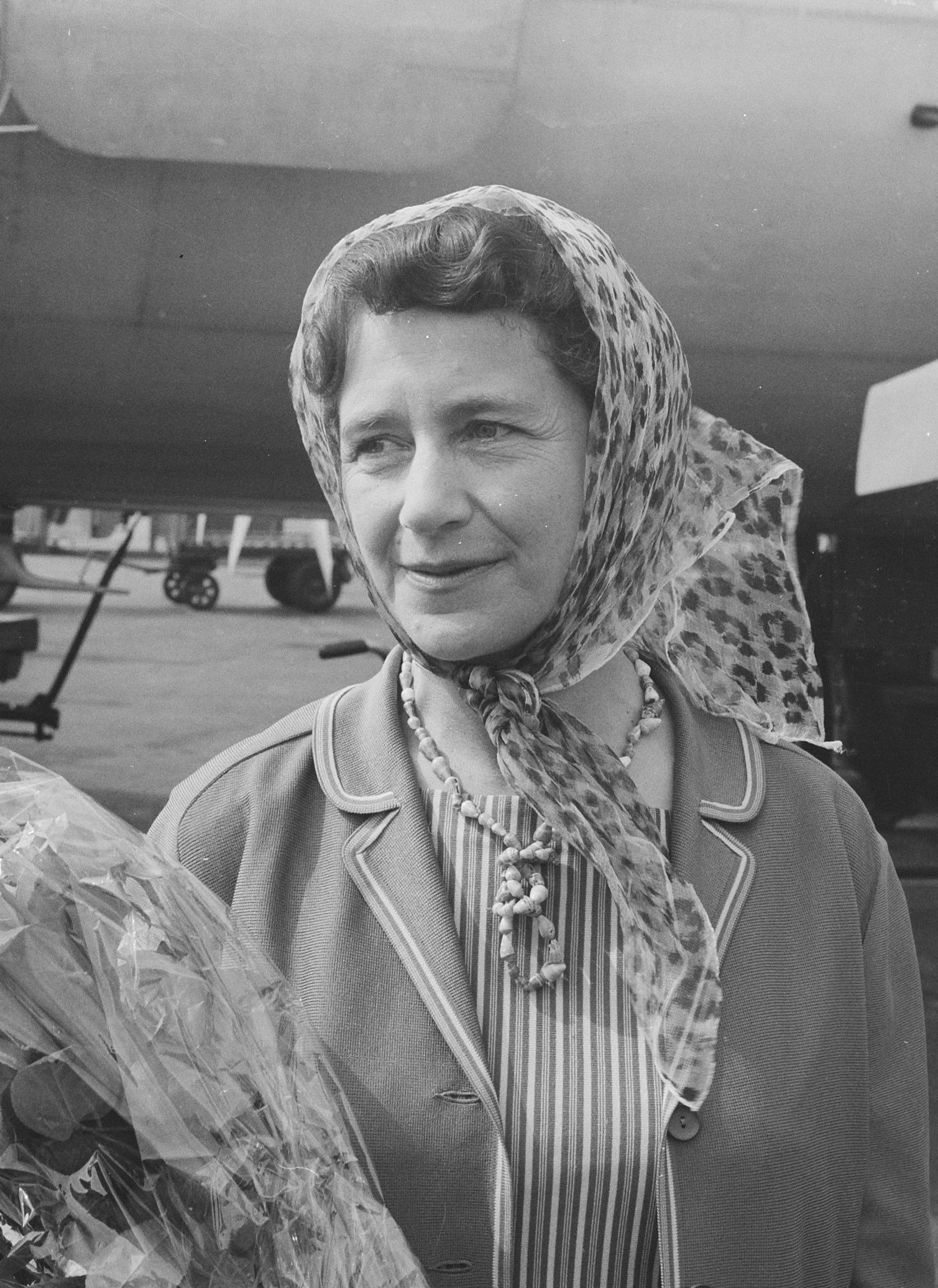 Actrice Peggy Ashcroft op Schiphol voor optreden in Stadsschouwburg